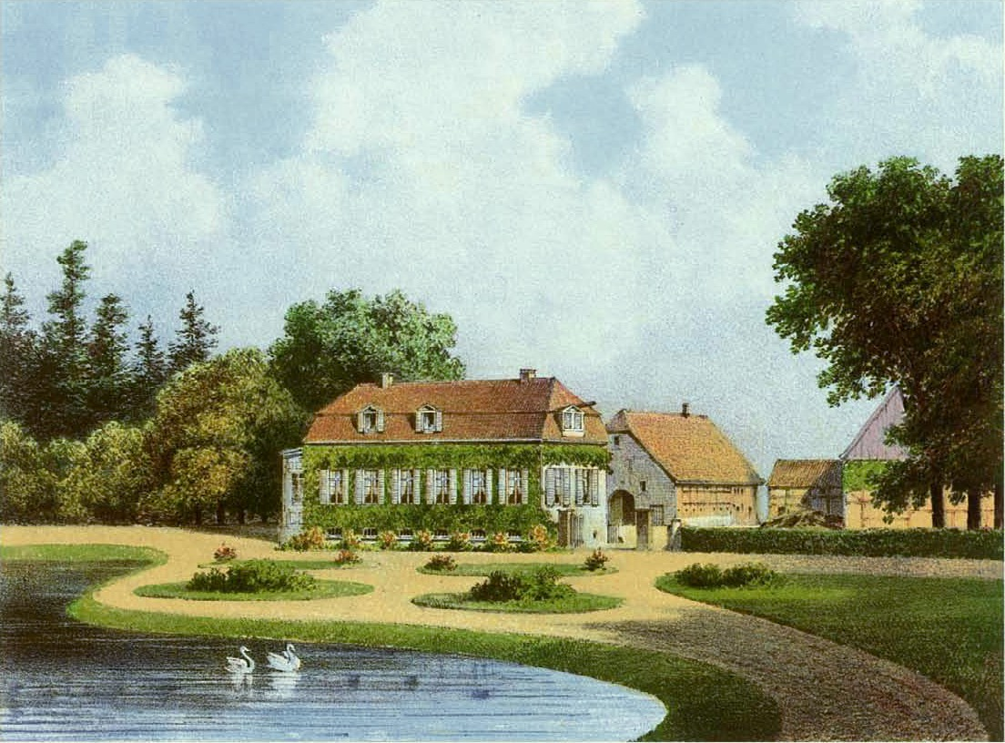 Rittergut Haus Geist, Kreis Münster, Provinz Westphalen